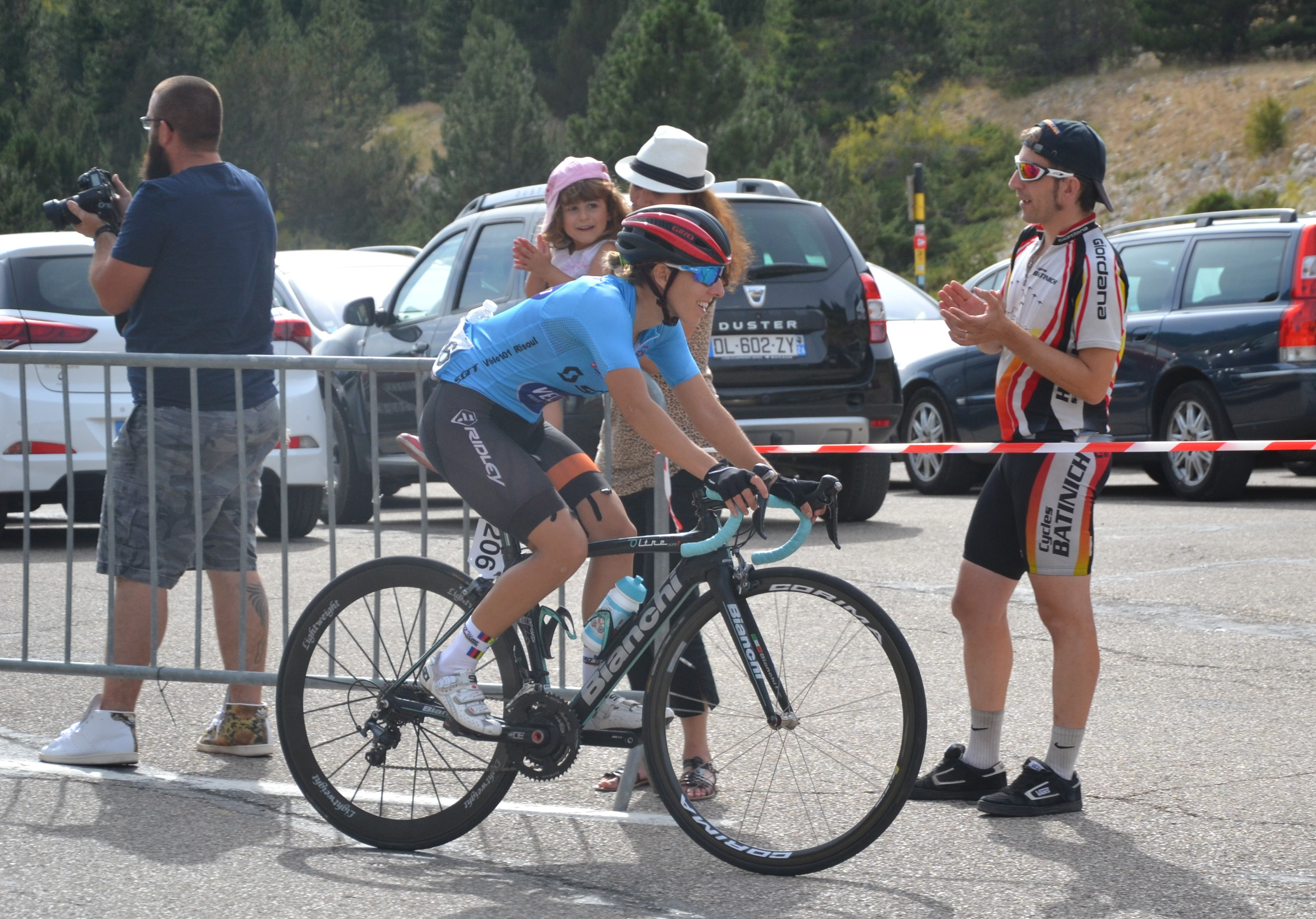 3ème étape du Tour féminin international de l'Ardèche 2016, lors de l’ascension du Mont Ventoux